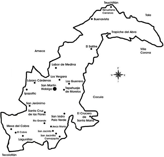 San Martín Hidalgo y sus Comunidades.